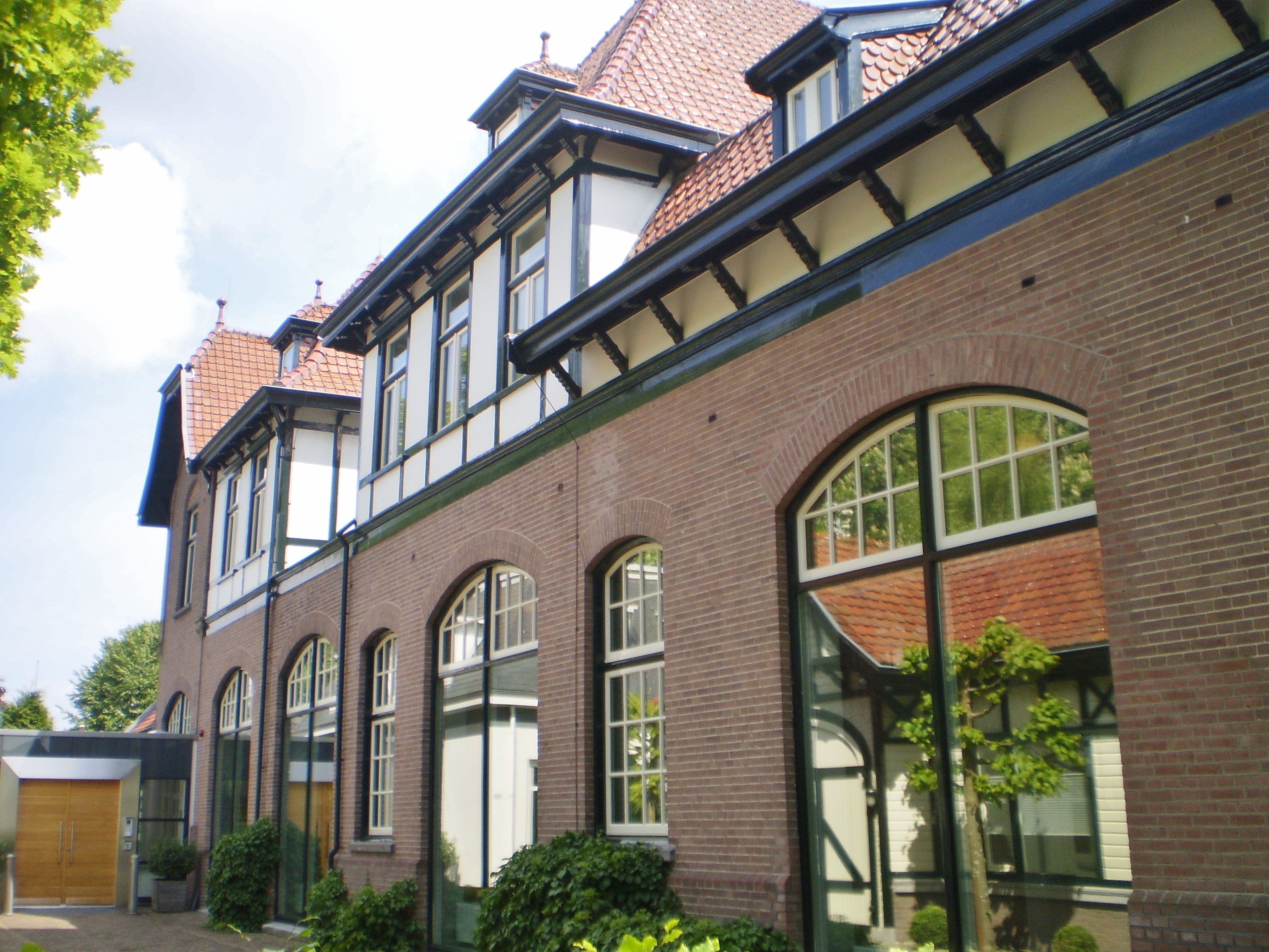 Bijgebouw met het koetshuis zichtbaar in de spiegeling van de ruiten